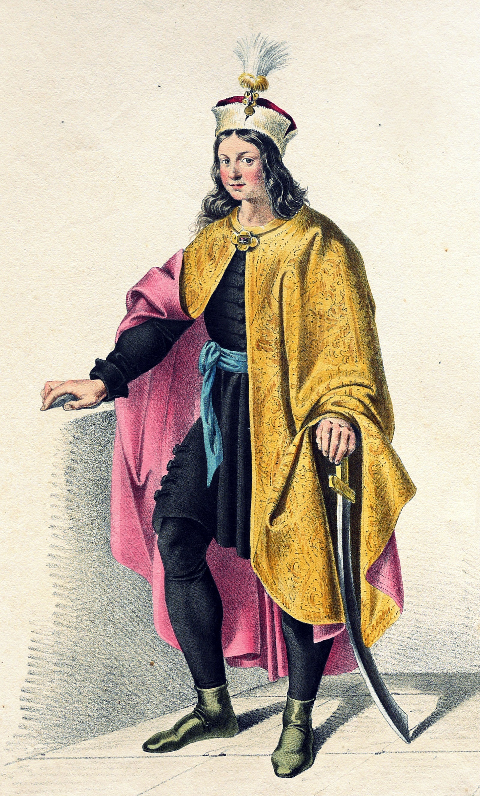 Stephan III. (1147-1172), König von Ungarn etc. Lithographie von Josef Kriehuber nach einer Zeichnung von Moritz von Schwind aus Ungerns Erste Heerführer Herzoge und Koenige In einer Reihe von Bildnissen von Bela bis auf Seine Majestät Franz I. Kaiser Von Österreich König Von Ungern &c., &c. Wien : Lithographisches Institut ;ca. 1828.